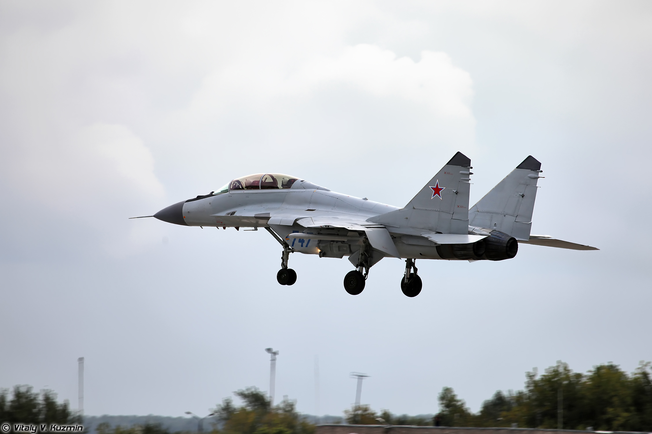 МиГ-29М2 (MiG-29M2)